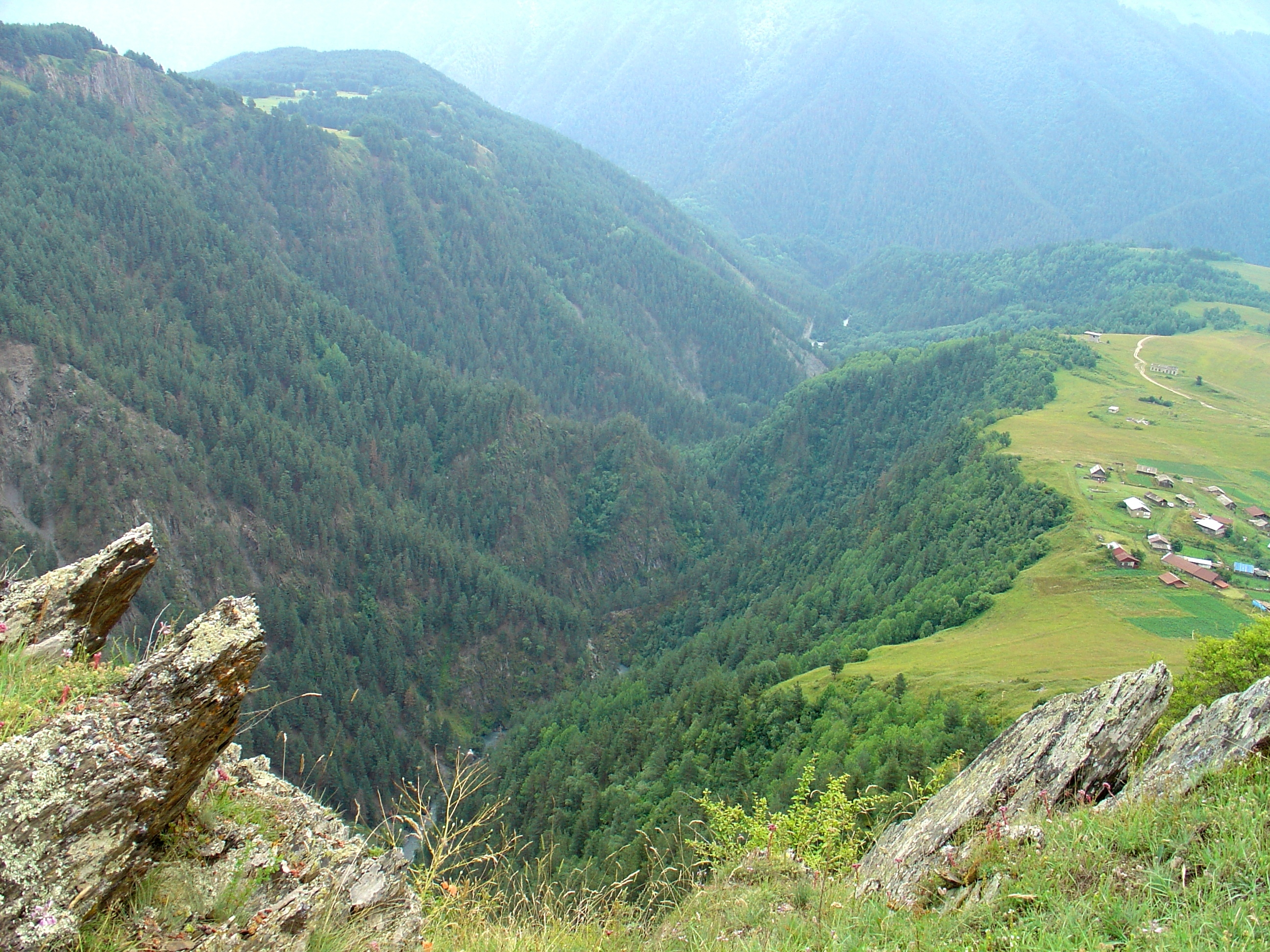 პირიქითა ალაზანი